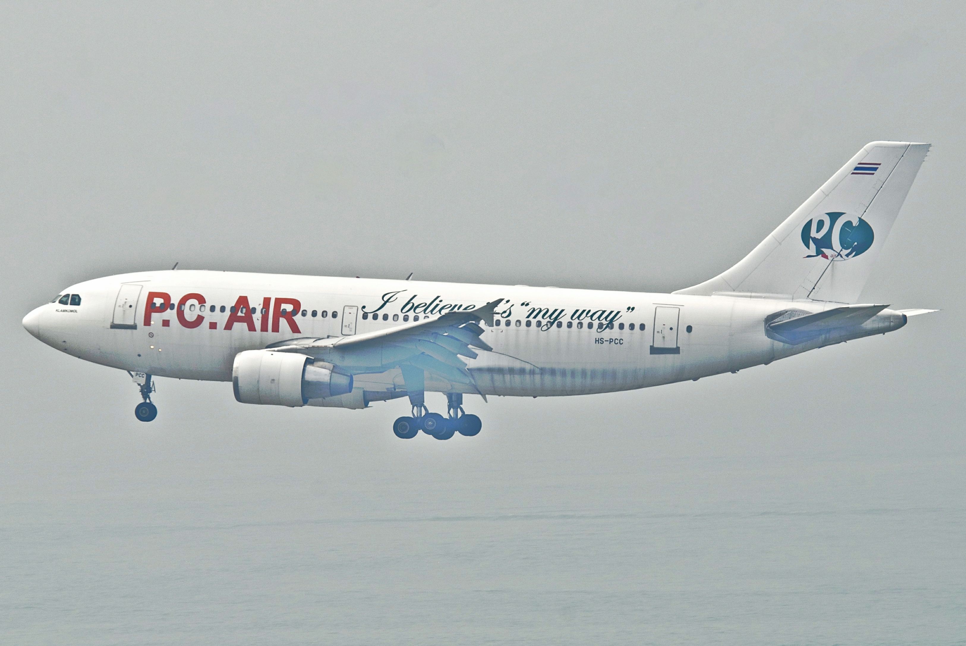 PC Air Airbus A310-222; HS-PCC@HKG;03.08.2012/669dp